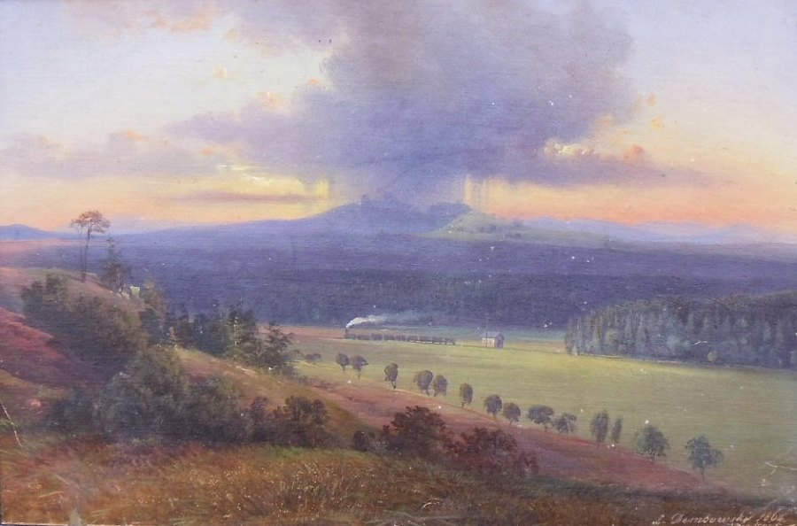 Pejzaż